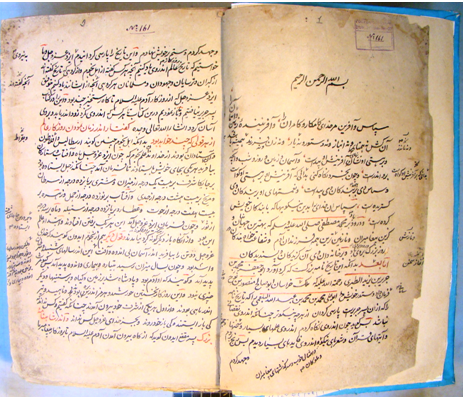 Копия рукописи Абуджафара Мухаммада ибн Джарира Табари "Таърихи Табари" ("История Табари")Тоҷикӣ: Нусхаи дастхати Абўҷаъфар Муҳаммад ибни Ҷарир ат-Табарӣ «Таърихи Табарӣ»